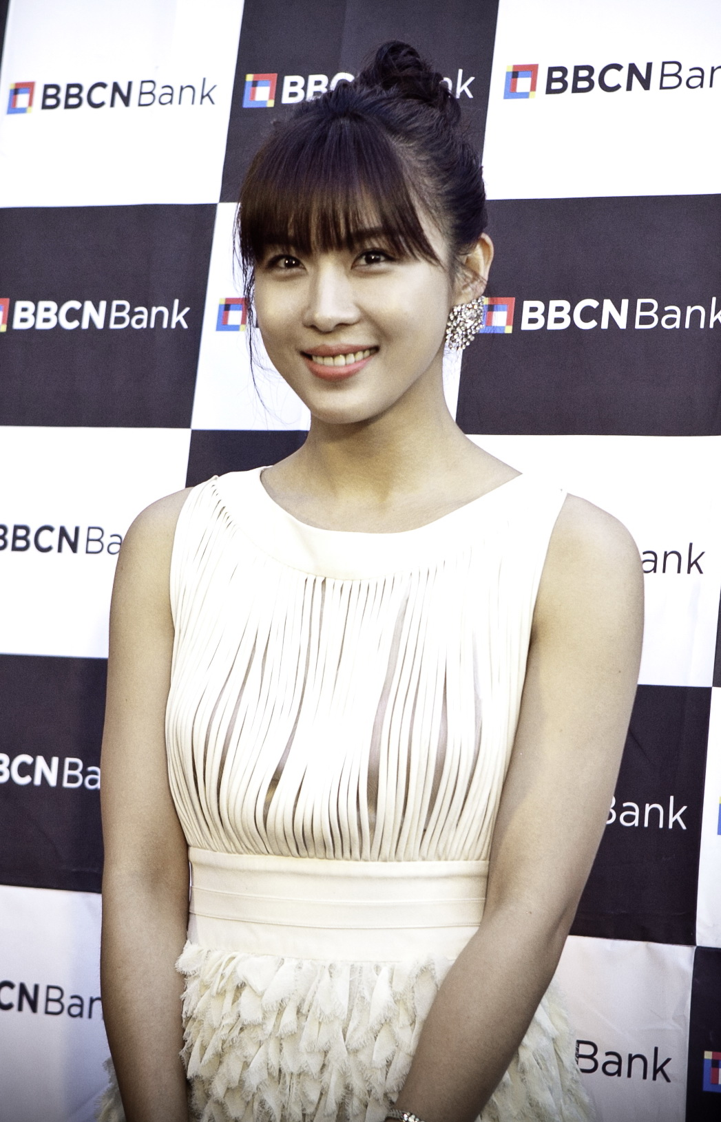 актриса Ха Чи Вон